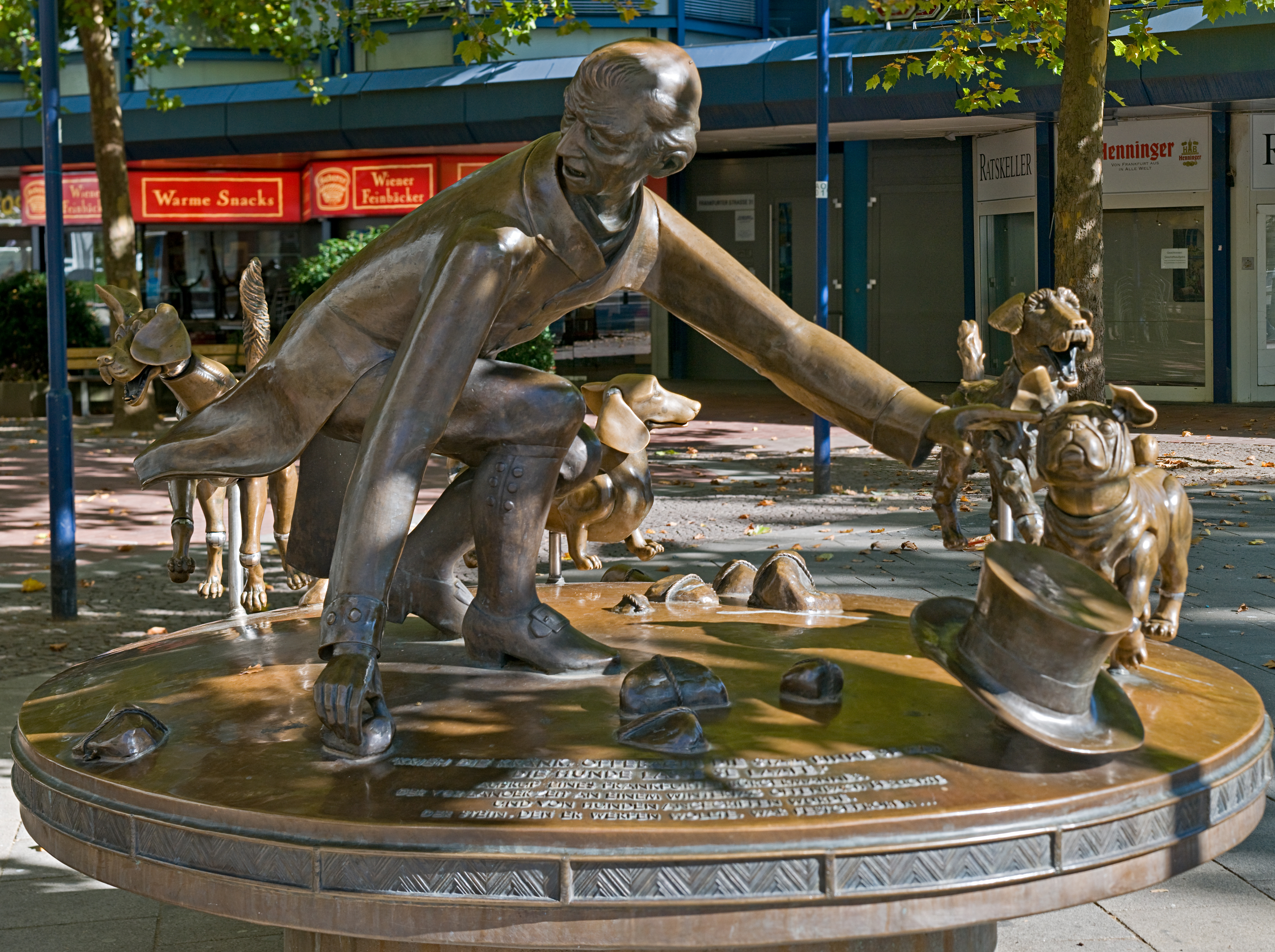 Krieh die Kränk, Offebach! Skulpturengruppe von Bonifatius Stirnberg in der Offenbacher Innenstadt, gestiftet von der Apotheke zum Löwen Gesamtansicht